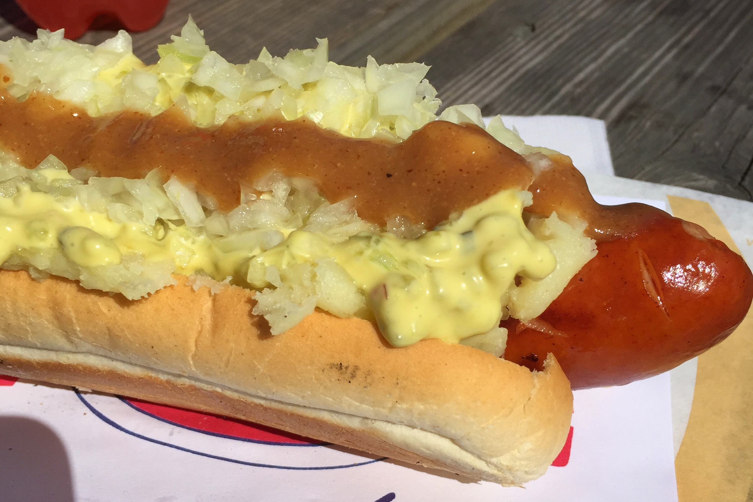 En "Halv spesial" hos Lennarts på Alnabru.